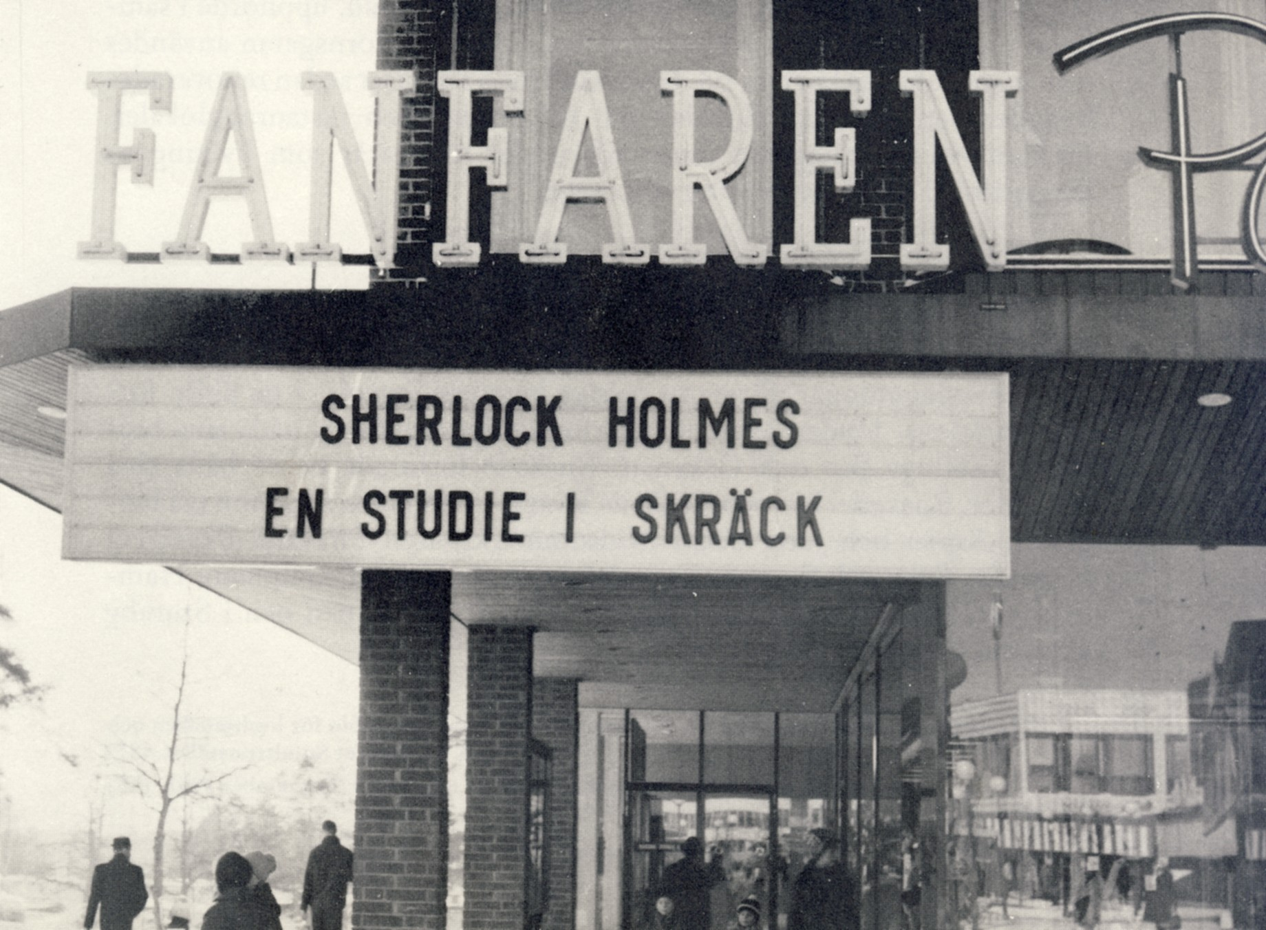 Biografen "Fanfaren" i Farsta Centrum, Stockholm